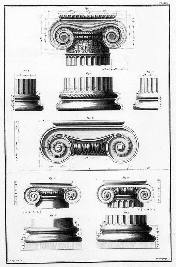 Greek Ionic order